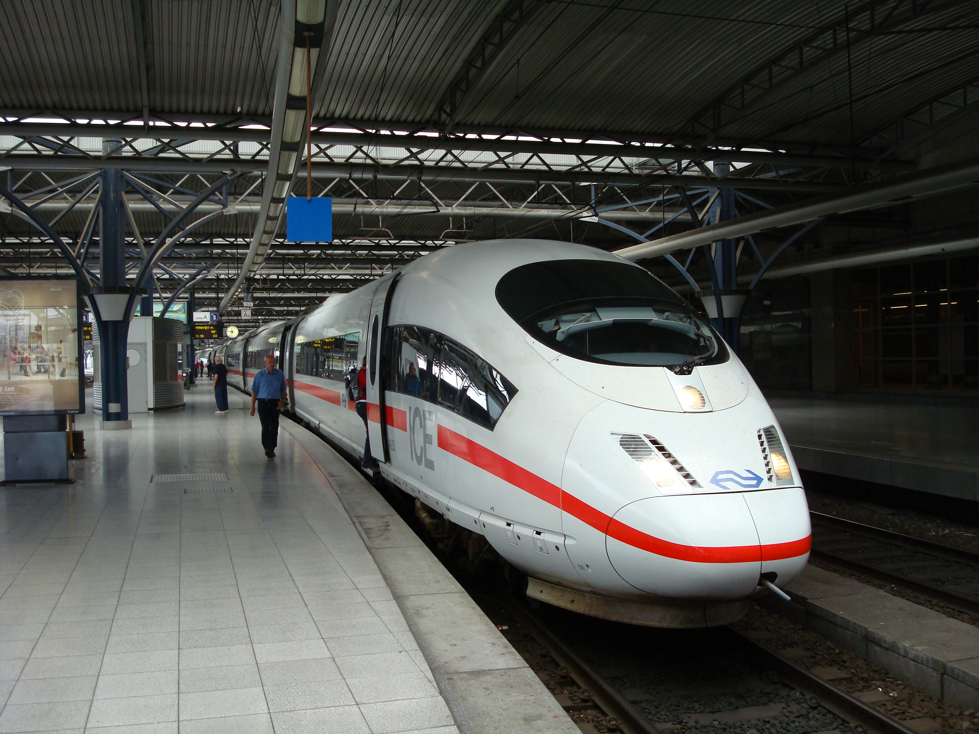 荷蘭國鐵ICE3M停靠布魯塞爾南站並將開往法蘭克福